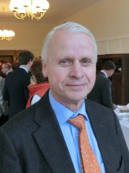 Porträtfotografie von Prof. Dr. med. Hans-Jörg Oestern